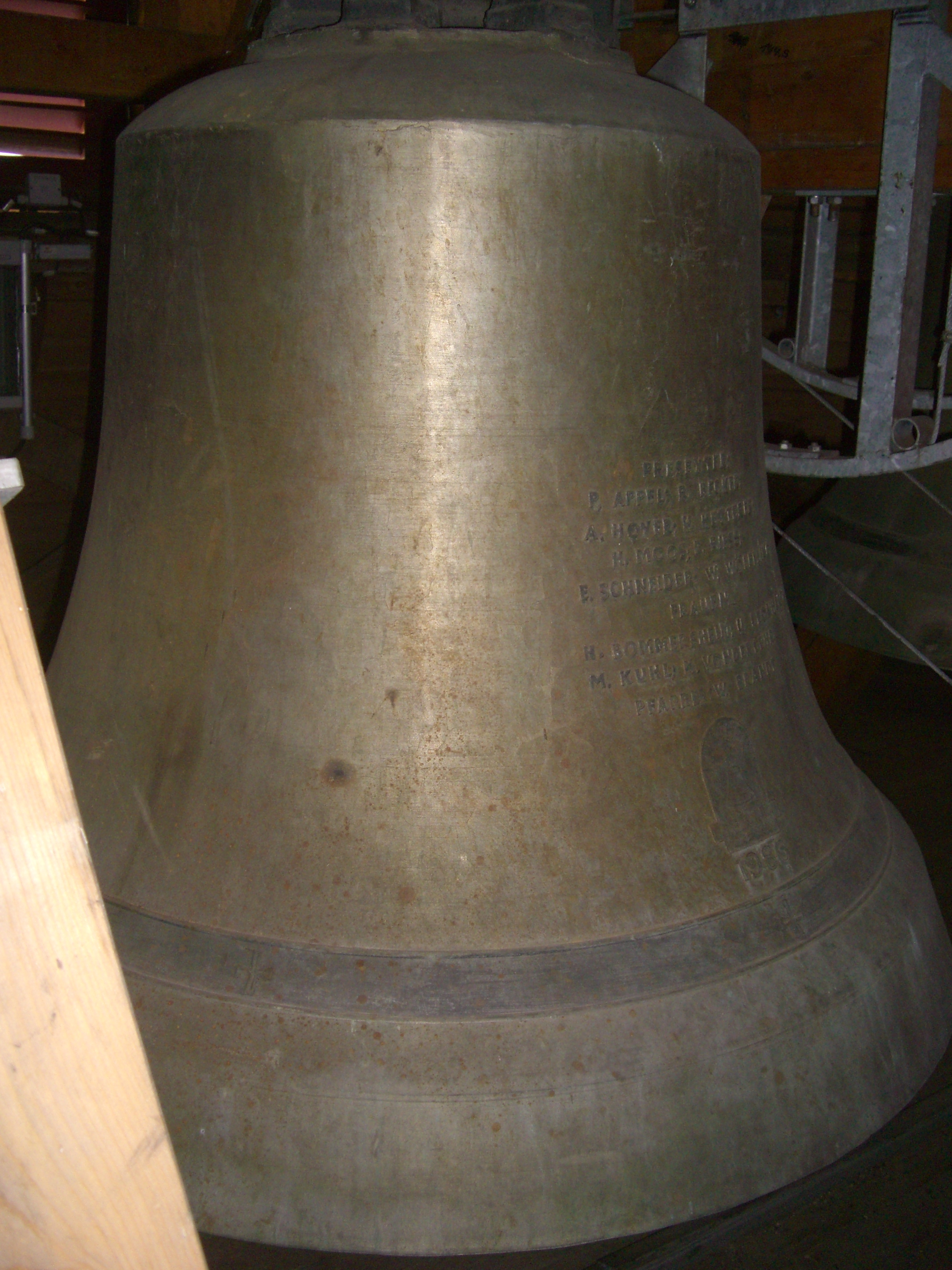 e-Glocke von 1986 im Kirchturm der Evangelisch-reformierten Kirche in Wölfersheim. Mit freundlicher Genehmigung der Kirchengemeinde.